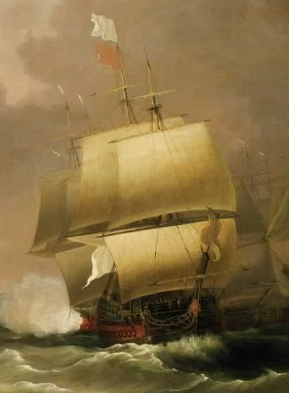 Vaisseau-amiral français le Soleil Royal à la bataille des Cardinaux, le 20 novembre1759. Guerre de Sept Ans. Détail d'un tableau anglais.